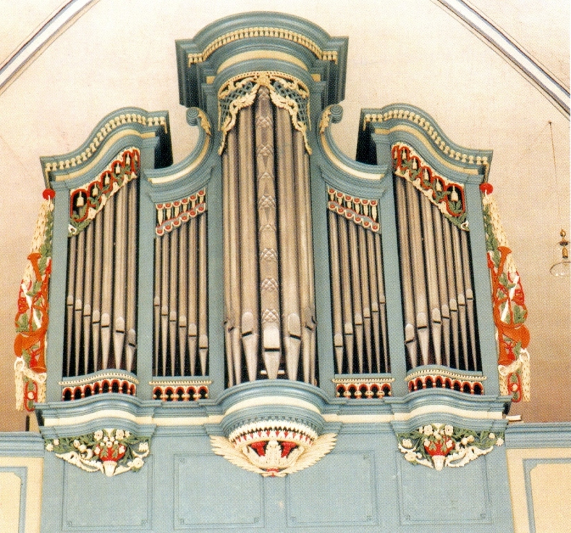 Stumm Barockorgel Pfarrkirche St. Margaretha Hasselbach im Taunus